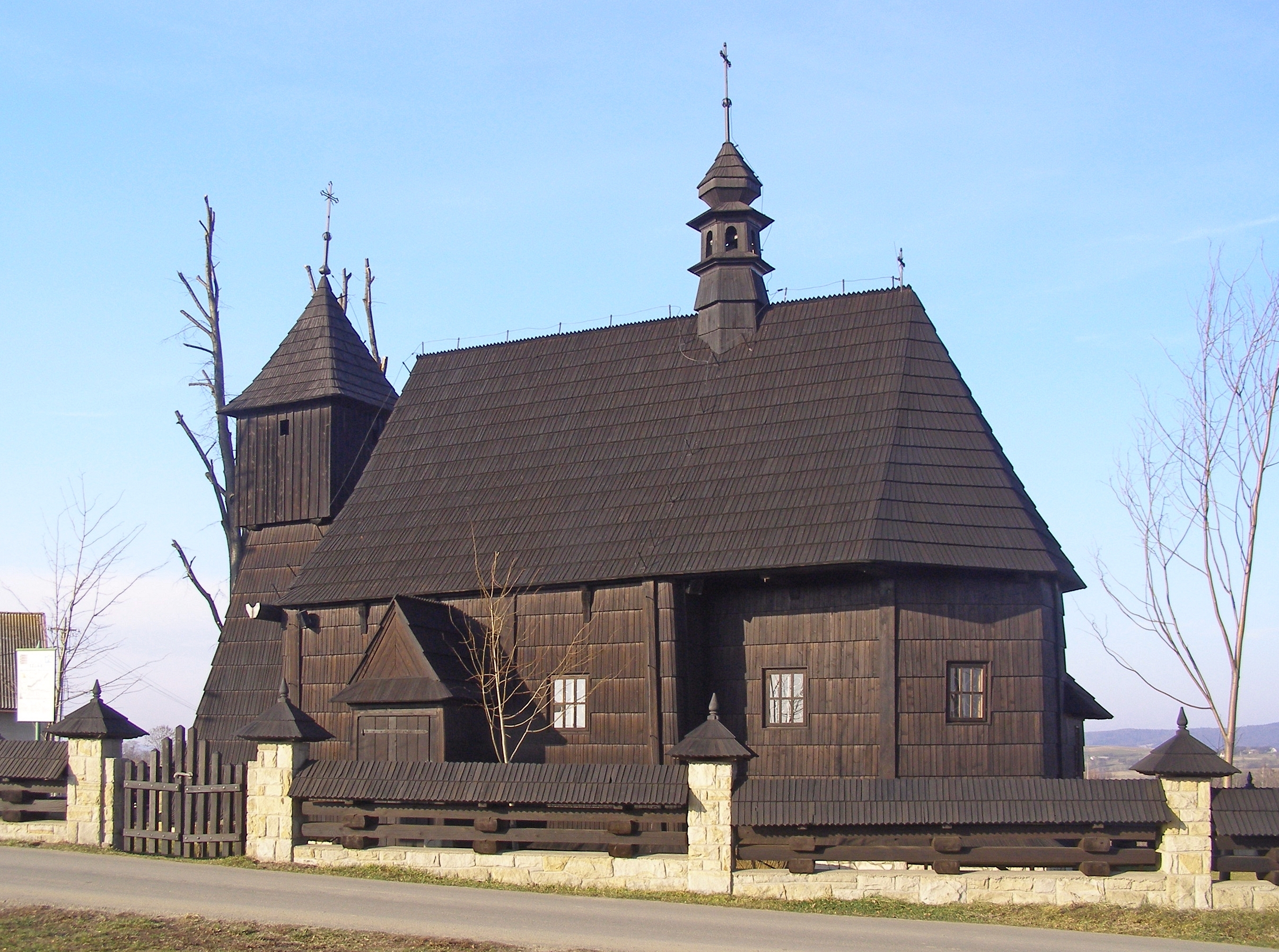 wieś Rzepiennik Biskupi